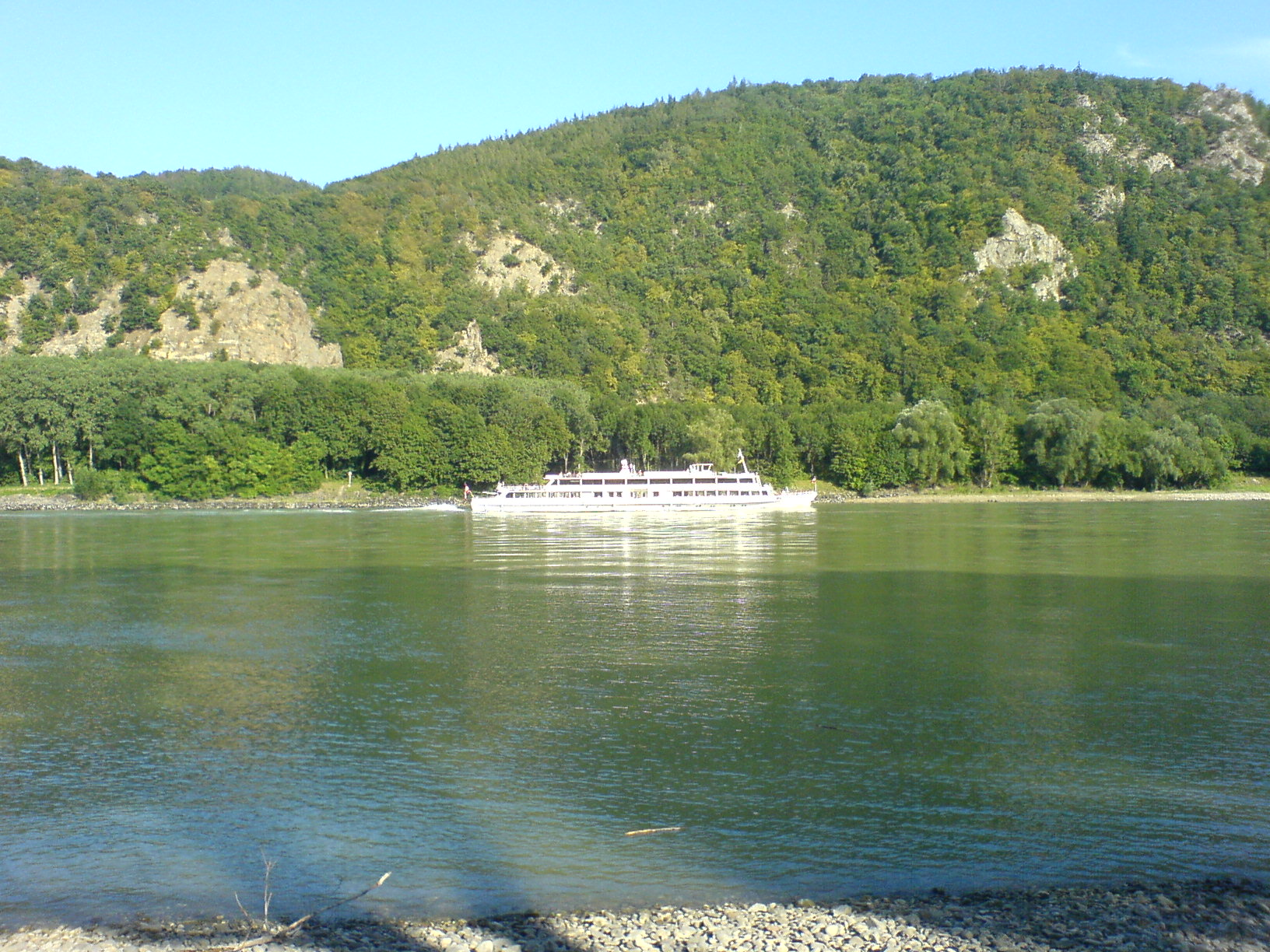 Donauschiff_Wachau